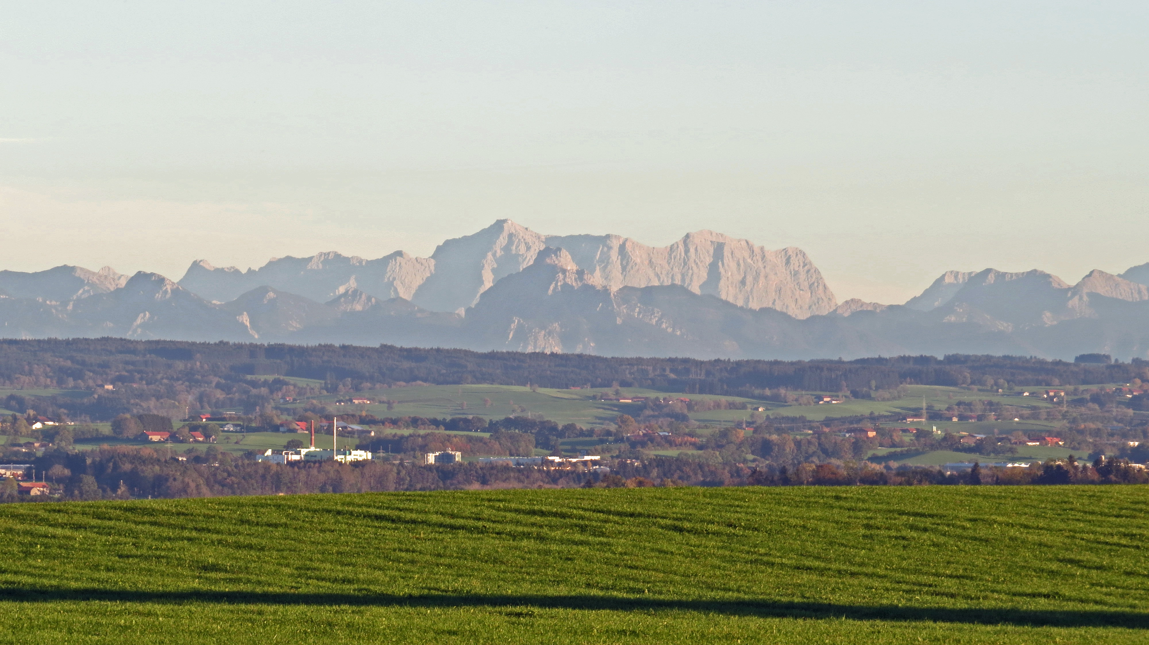 Blick von Altusried zum Wettersteingebirge mit Zugspitze